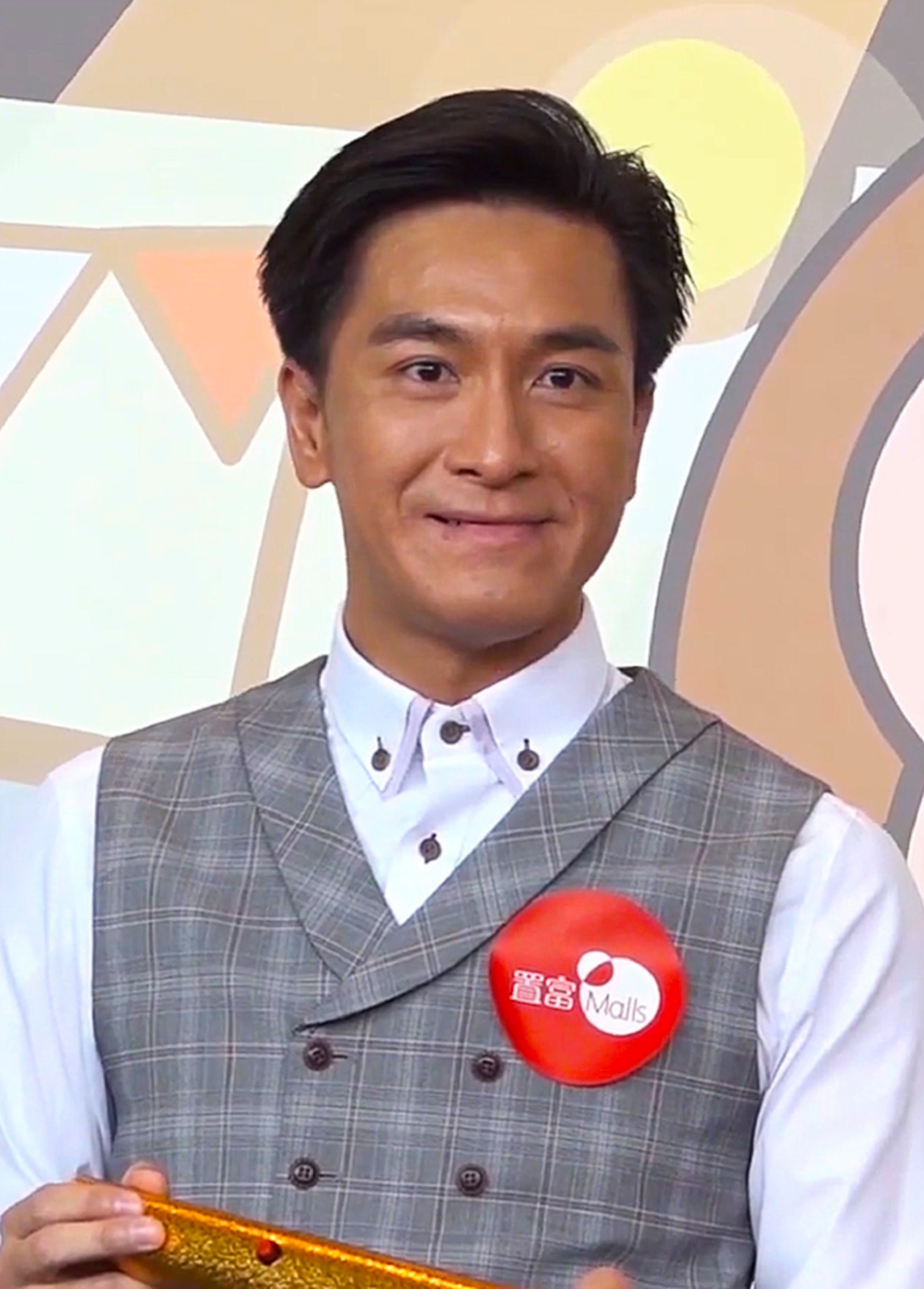 中文（香港）: OSARU NO MONKICHI『夏日狂熱運動會』開幕禮